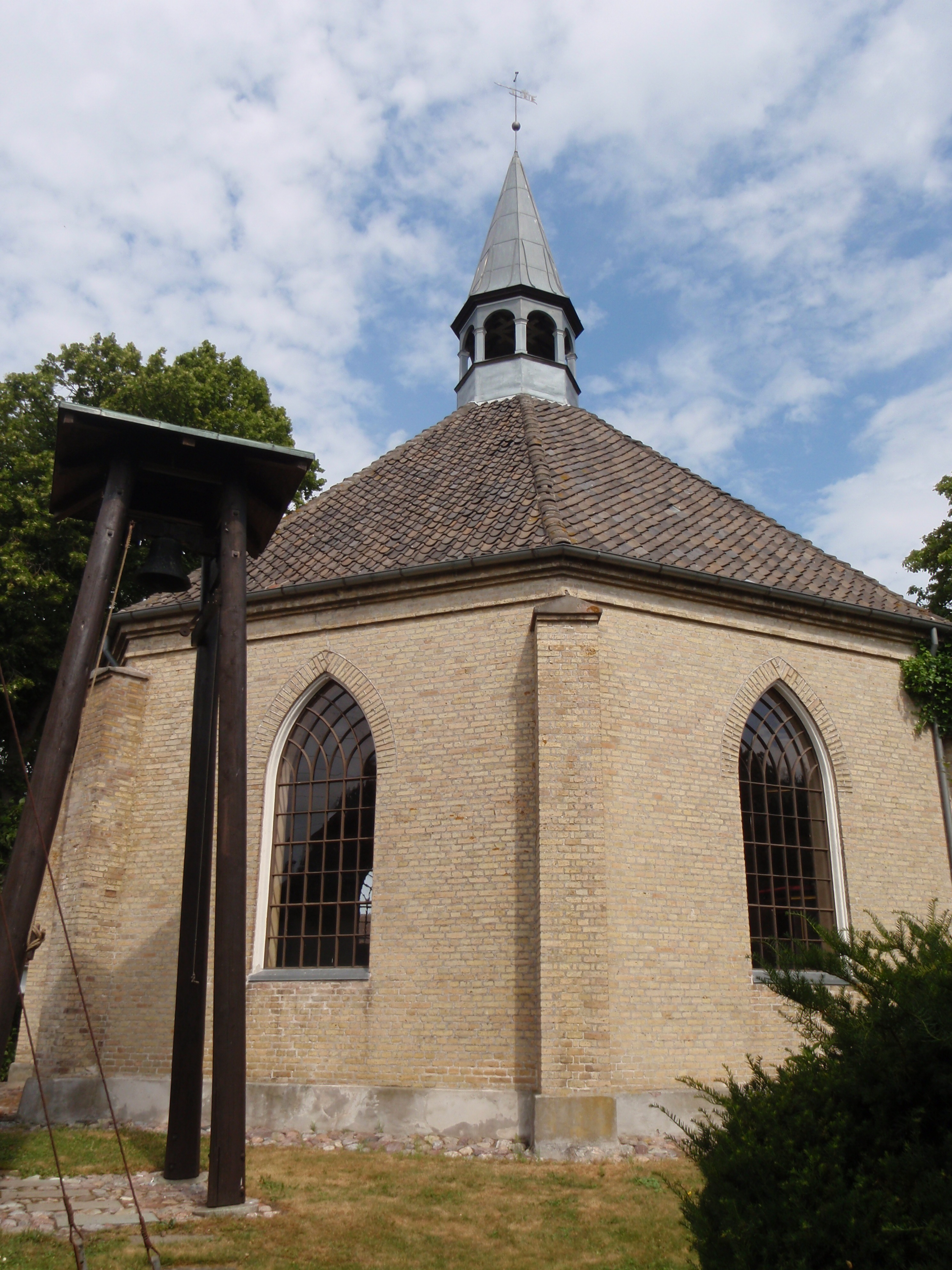 Kirken i Nyord